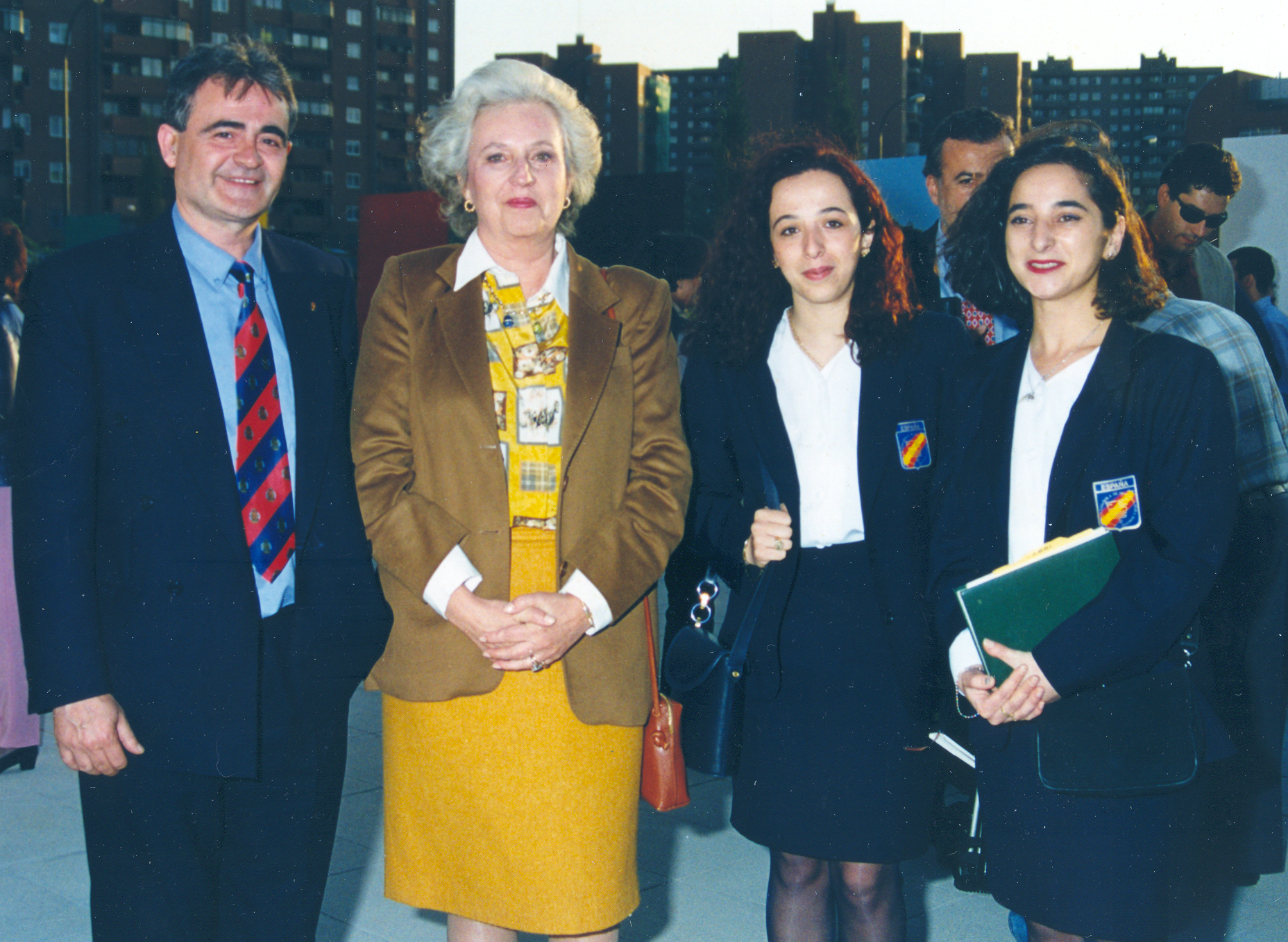 Con la hermana del Rey, doña Pilar de Borbón, después de la asamblea del Comité Olímpico Español